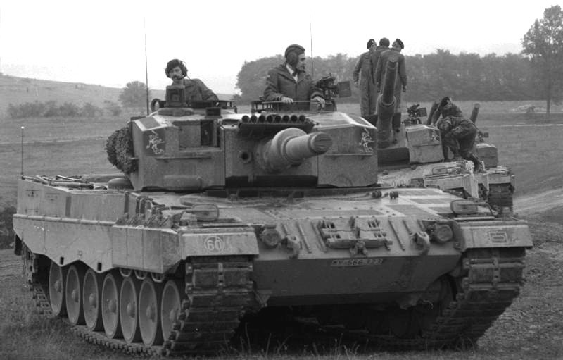 23.9.1986 Mitarbeiter des Bundespresseamtes beobachten das Herbstmanöver "Fränkischer Schild" der Bundeswehr- mit Beteiligung zahlreicher Soldaten aus NATO-Mitgliederstaaten sowie eines französichen Großverbandes - im Raum Würzburg.